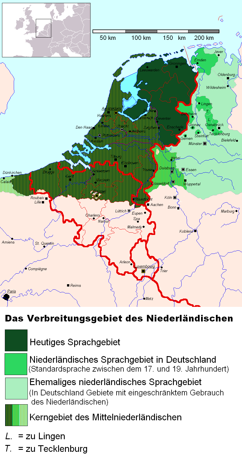 Karte mit der historischen und gegenwärtigen Verbreitung der Niederländischen Sprache